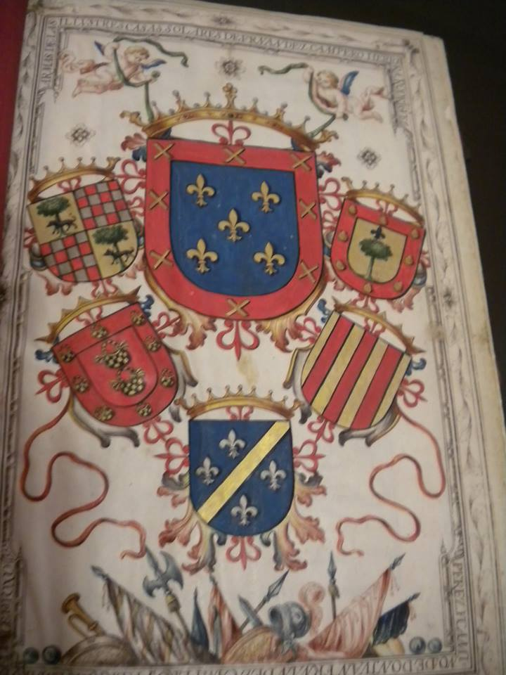 Heraldica otorgada por el Rey de Armas del Rey de España y de las Indias, Felipe V, a Don Juan José Fernández Campero, al momento de concederle el título nobiliario de Marqués del Valle de Tojo. En ella se encuentran representados los blasones de las familias de hidalgo de las cuáles descendía: Campero y Herrera.